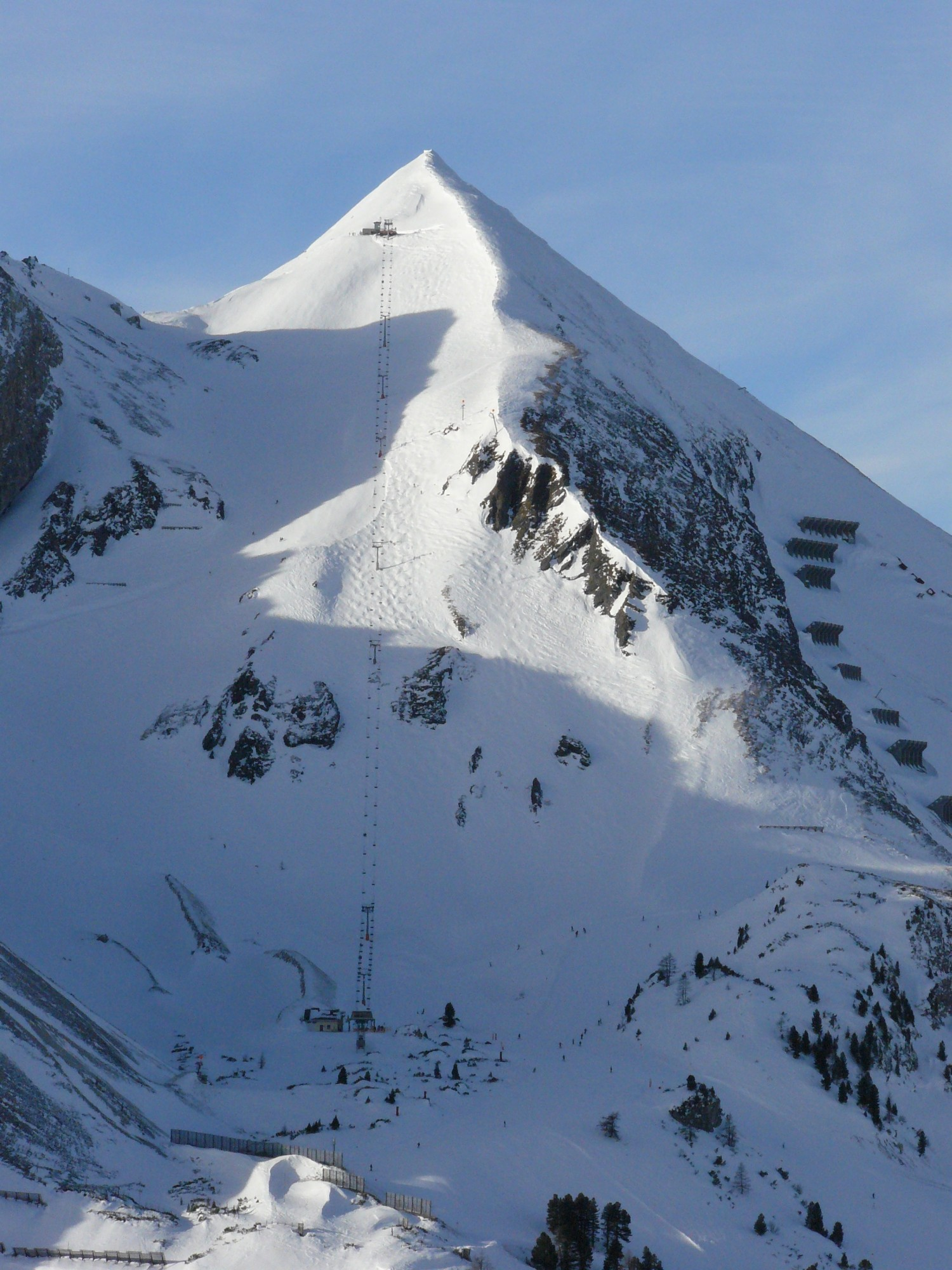 Blick auf die Abfahrt "Gamsleiten 2" um ca. 11:00 Uhr. Kamera: Panasonic DMC-FZ8 (ISO100, 1/400sec)